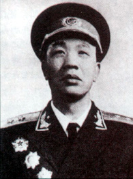 王恩茂将军1955年受勋照